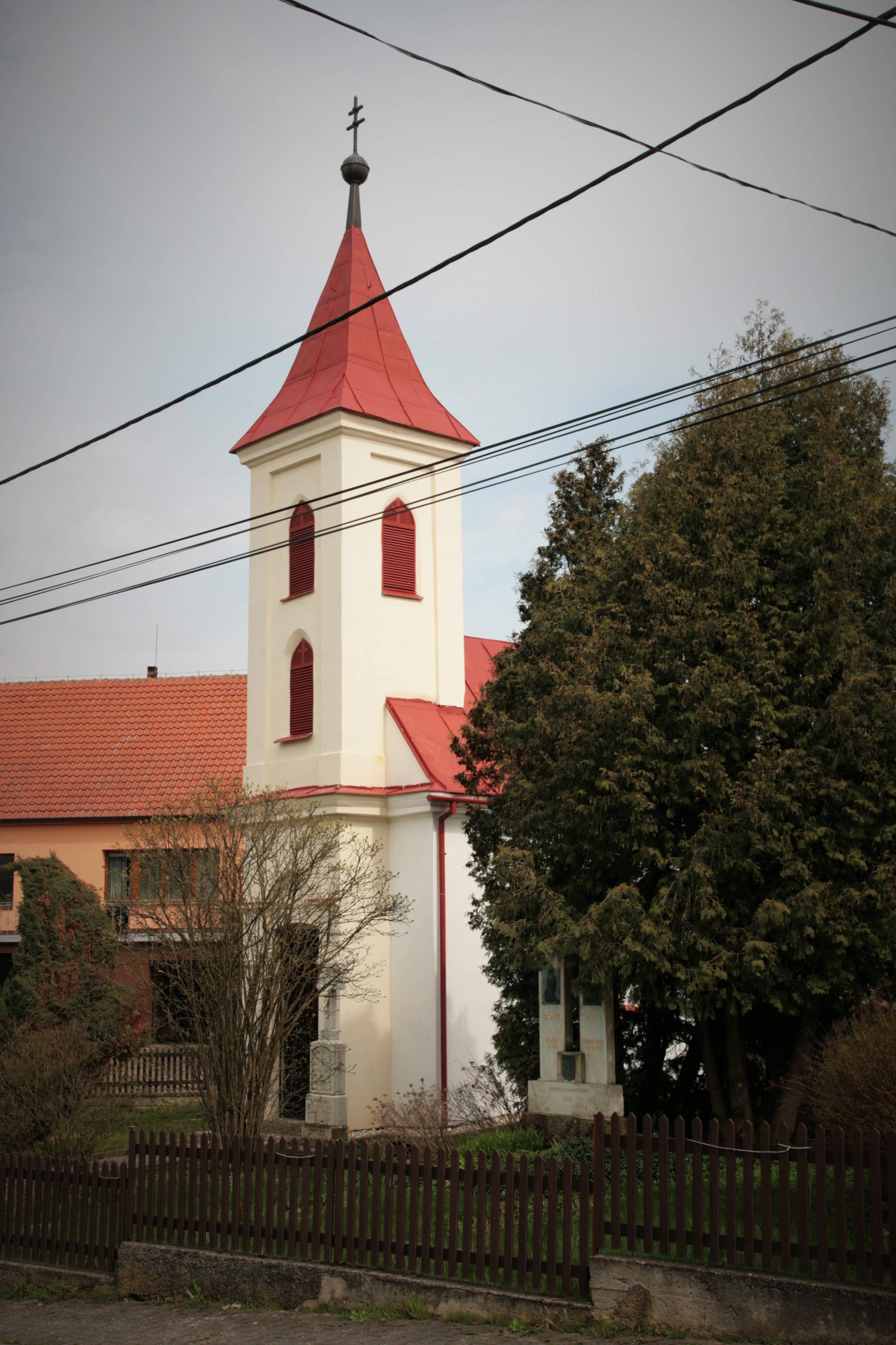 Vesnice Klokočí, část obce Olší v okrese Brno-venkov. Kaple na návsi.